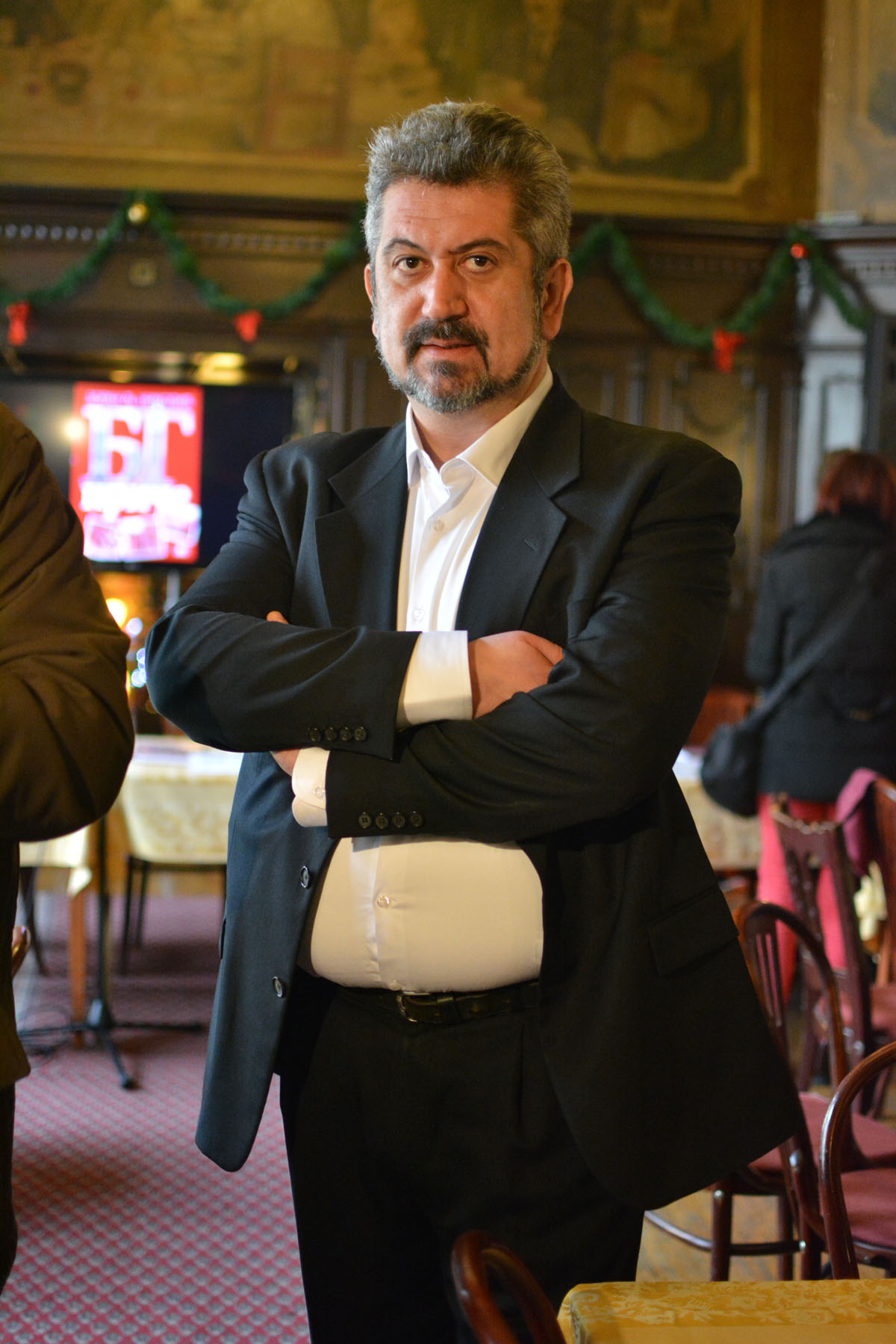 Зоран Љ. Николић